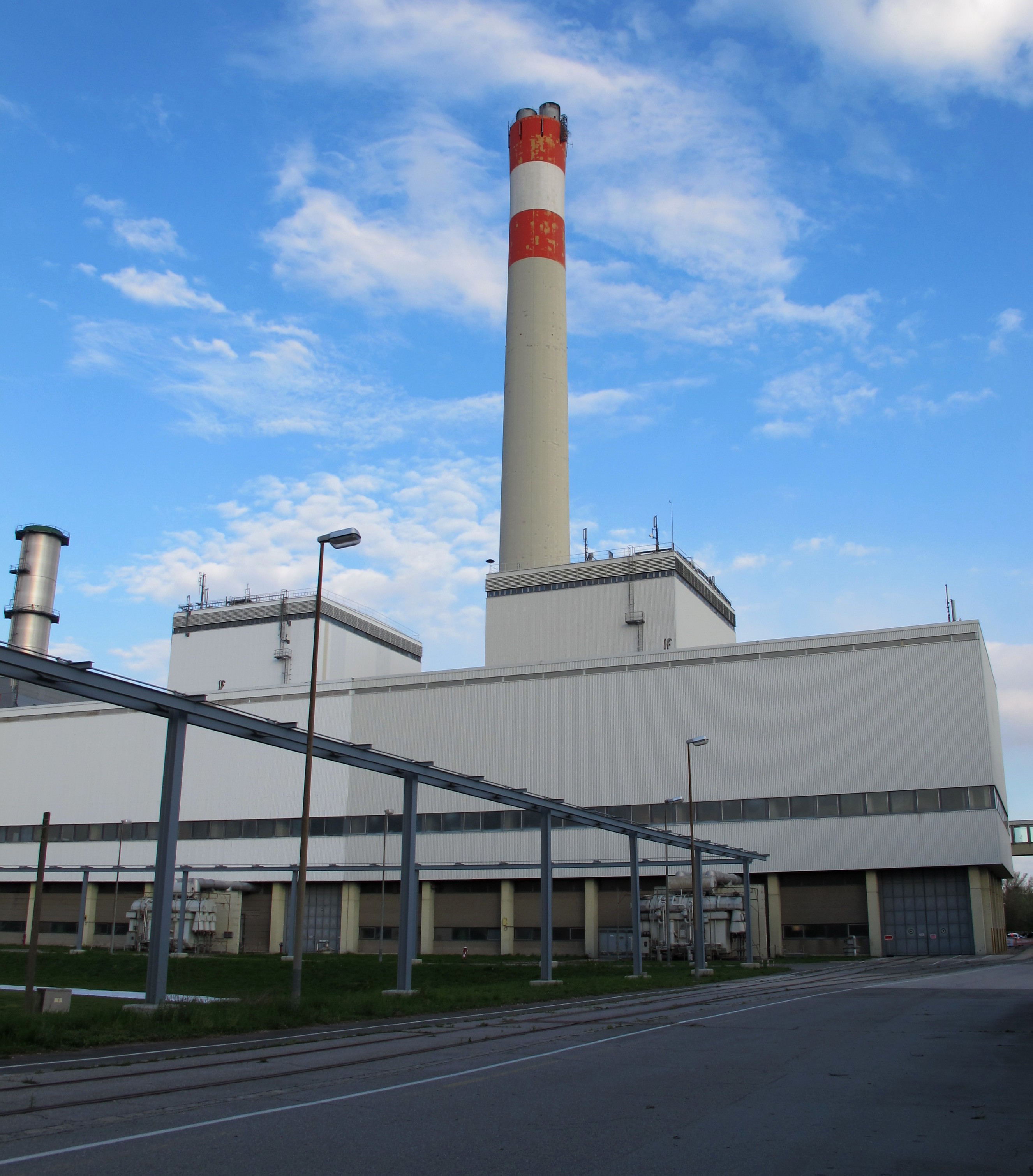 Kraftwerk Donaustadt, stillgelegter Block 1 und 2 mit gemeinsamen Schornstein